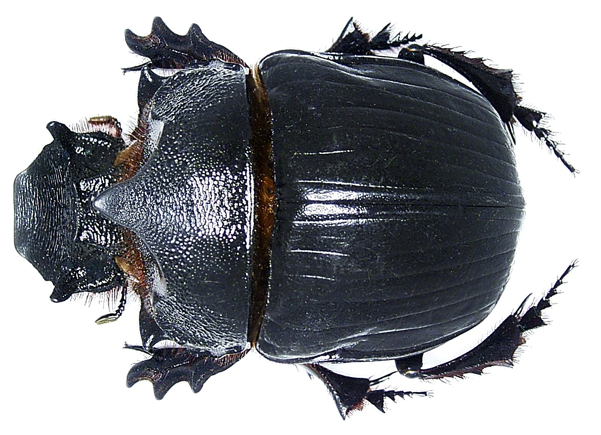 Familie: Scarabaeidae Grösse: 60 mm Fundort: Indien, Nilgiri Hills leg. Rautenstrauch; det. U.Schmidt Foto: U.Schmidt, 2005